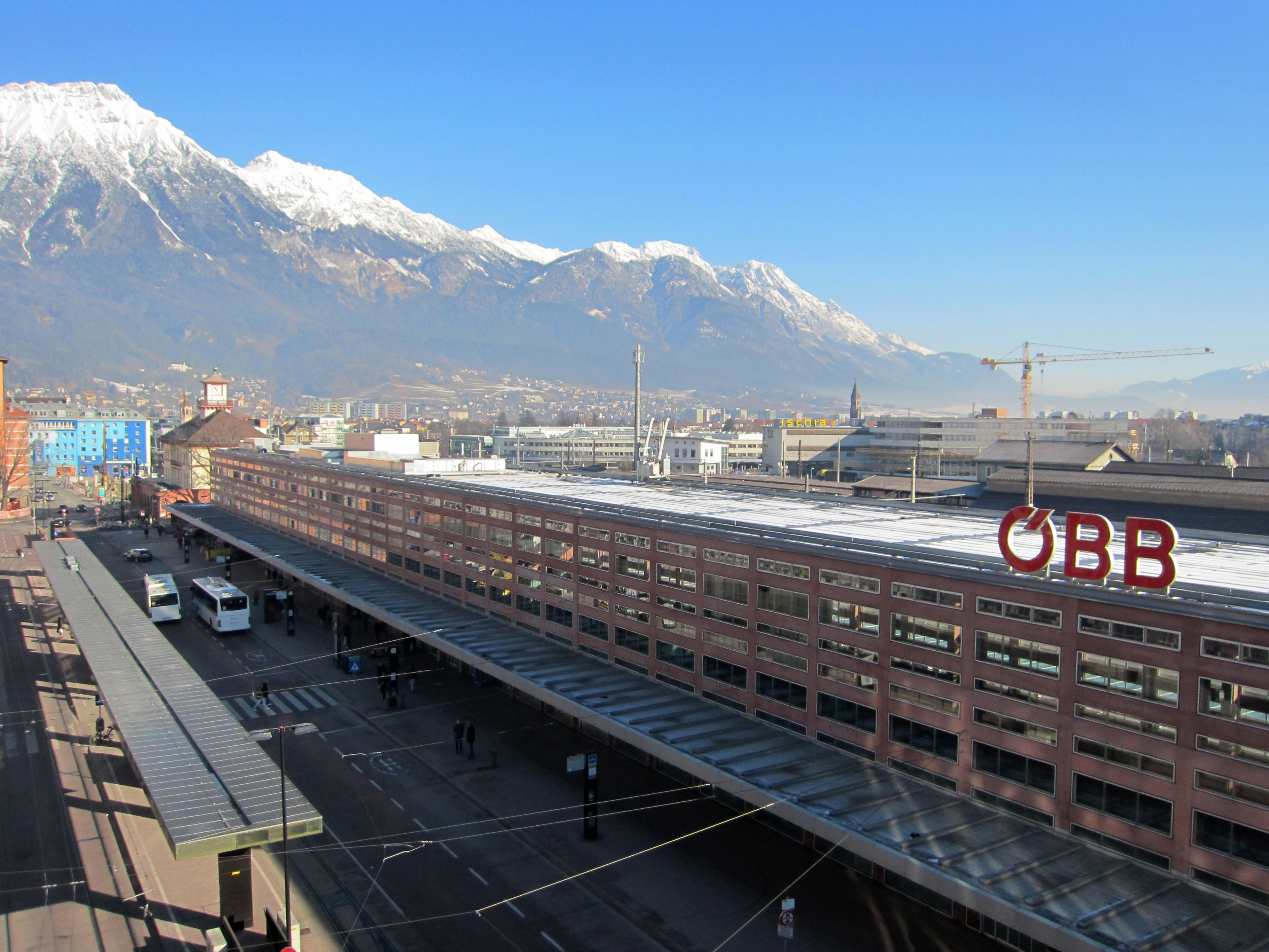 Gebäude des Innsbrucker Hauptbahnhofs mit Vorplatz und ÖBB-Logo, Blick nach Norden